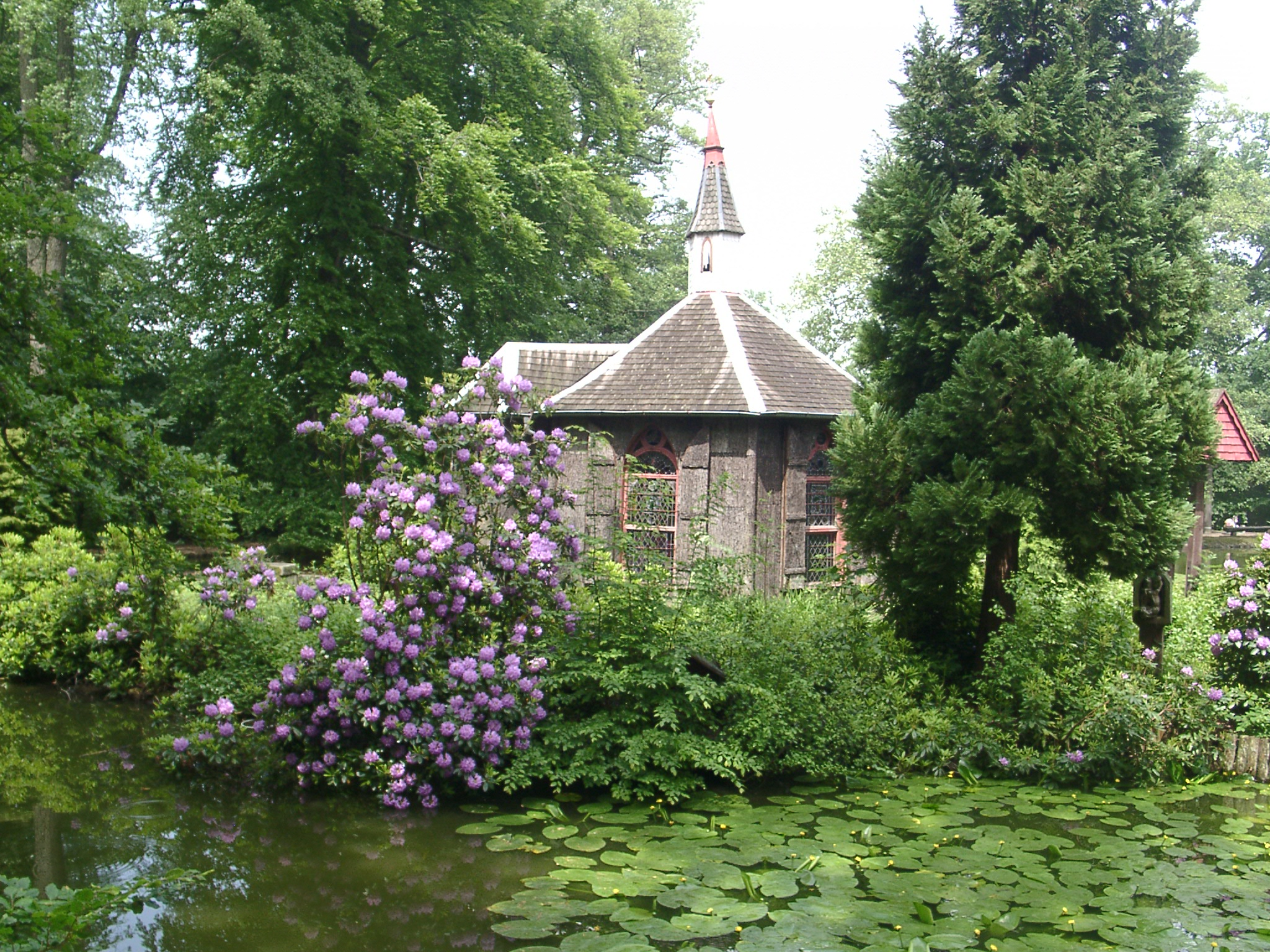 Eulbach, Englischer Garten